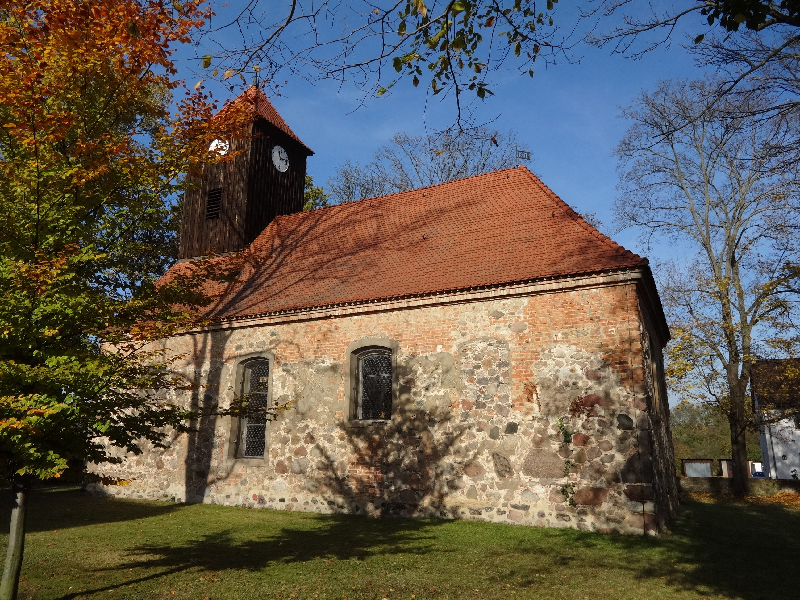 Die evangelische Kirche stammt vermutlich aus dem 14. oder 15. Jahrhundert. Sie ist aus auffällig ungleichmäßigen behauenen Feldsteinen gebaut und damit eine Besonderheit unter den Kirchen im Teltow. Im Innern befindet sich eine gotische Marienfigur aus dem 14. Jahrhundert